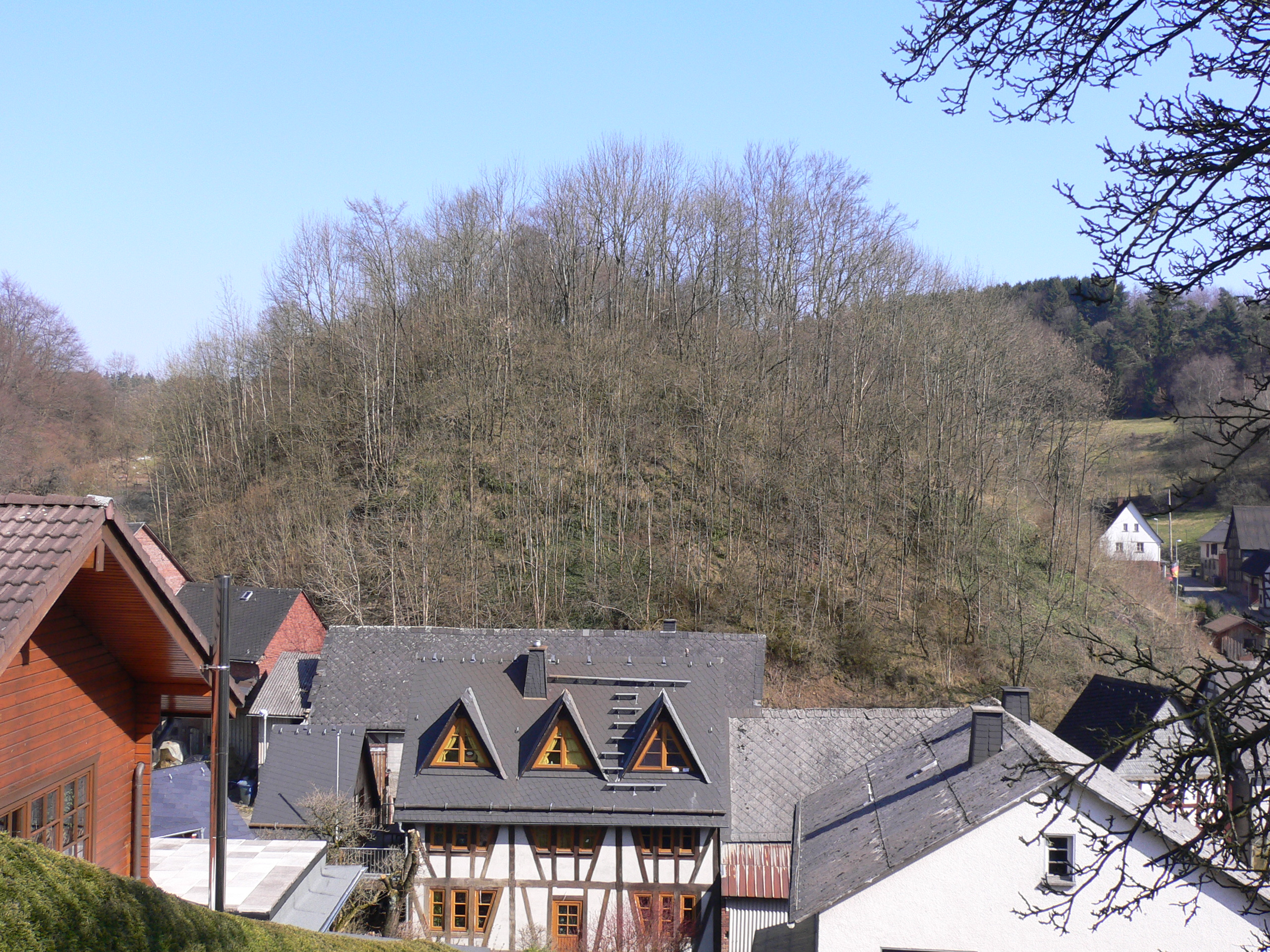 Burgberg der Ruine Burg Wallenfels